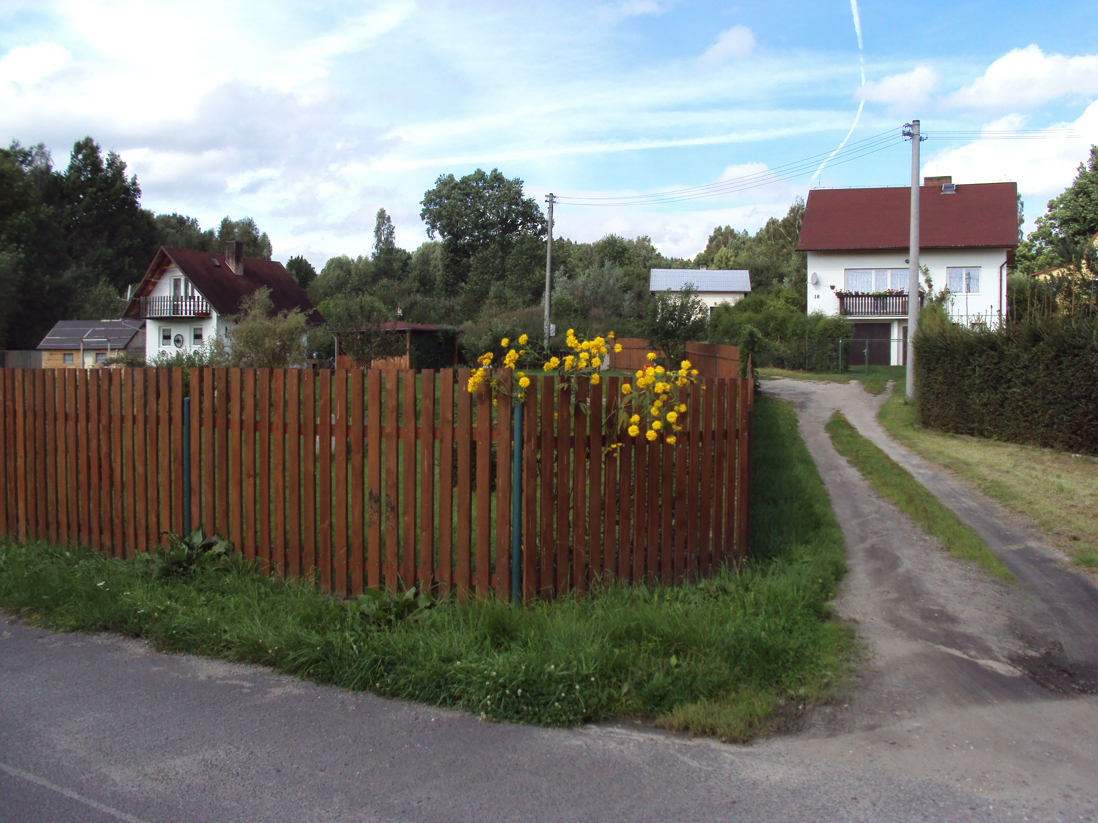 Nové domky v zaniklé čtvrti Robeč, dnes Dubice v České Lípě